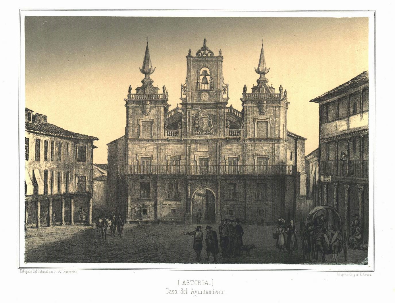 Casa del Ayuntamiento, Astorga, provincia de León, España.